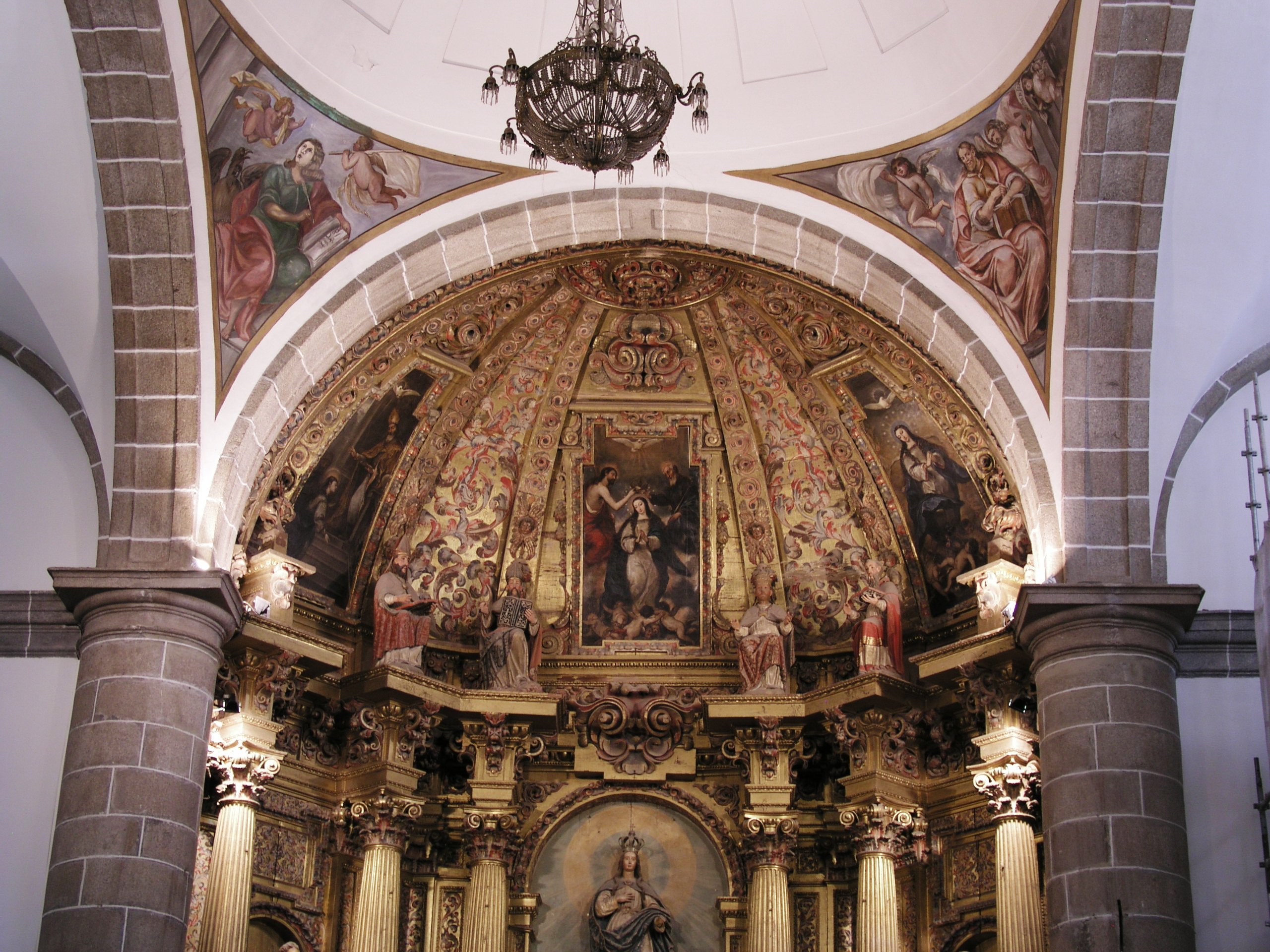 Navalcarnero, Iglesia Asunción de Nuestra Señora, Spain